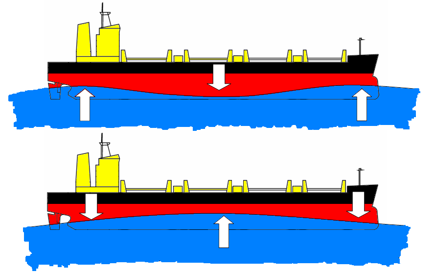 Esfuerzo de arrufo y quebranto. (spanish)